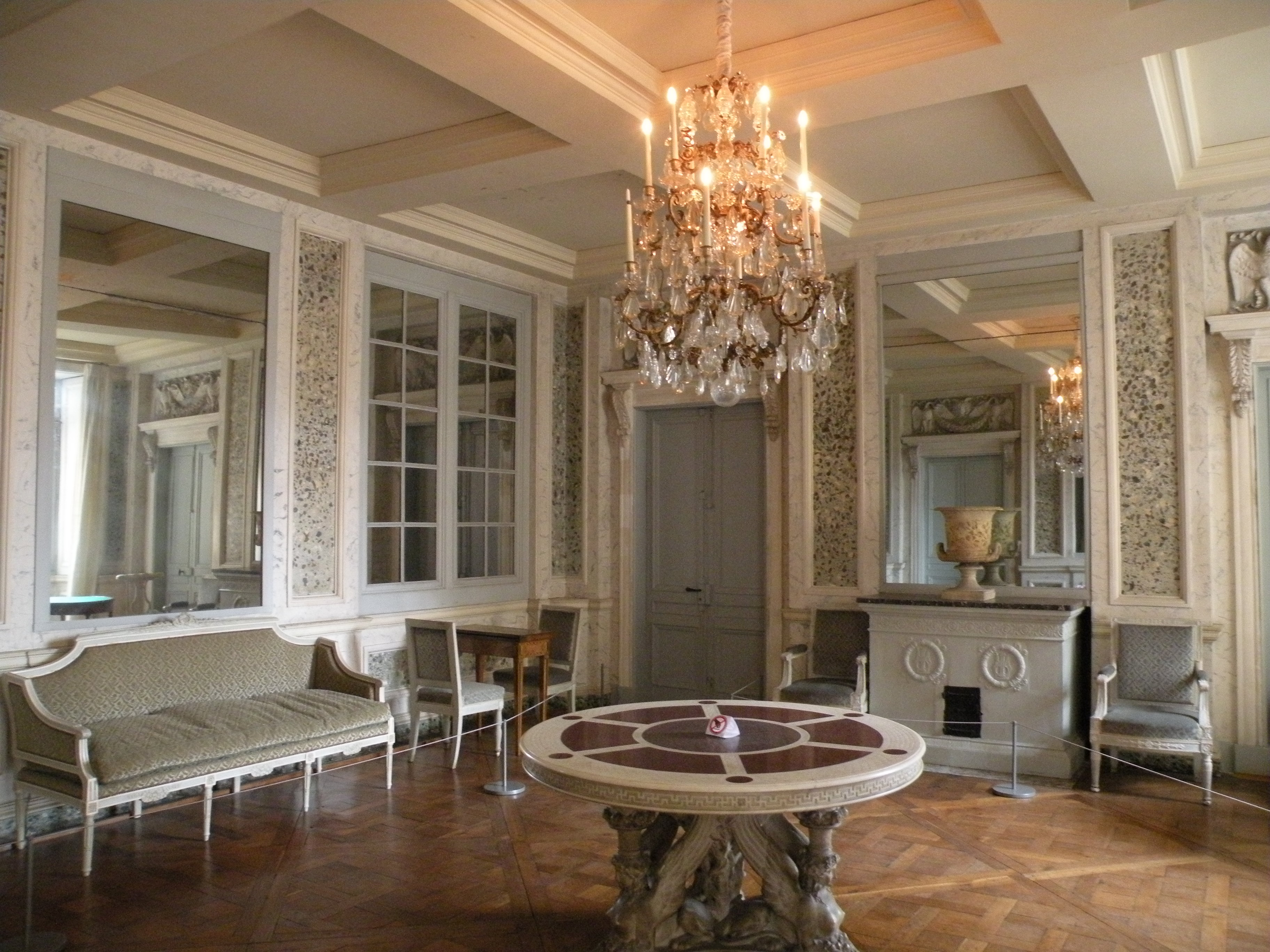 Château de Maisons-Laffitte - Salle de stuc